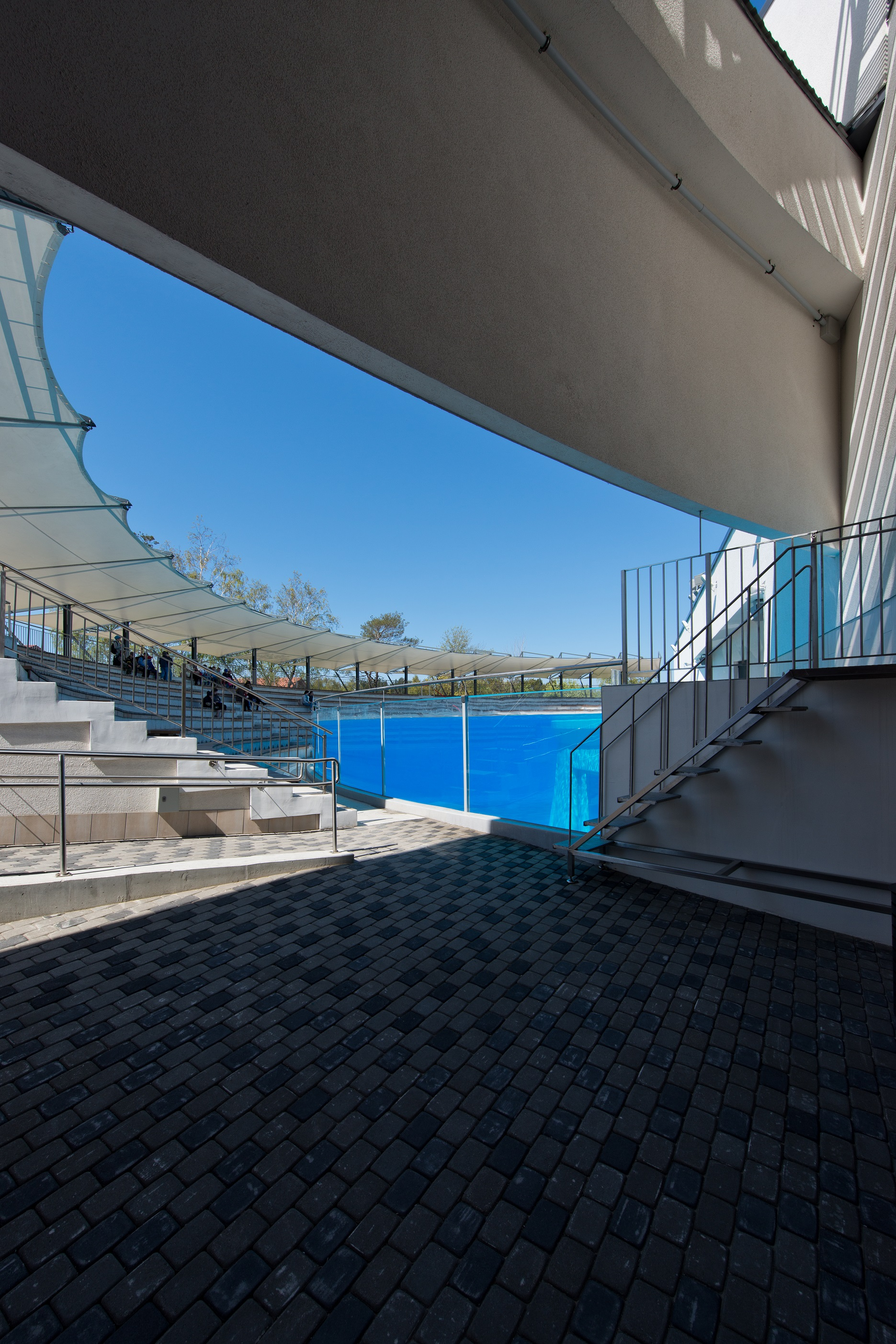 Fotografas: Leonas Garbačauskas